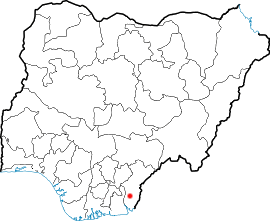 Calabarin sijainti Nigerian kartalla.